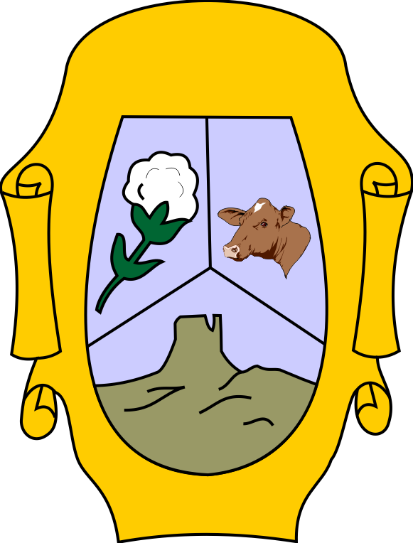 Escudo del municipio de Ahumada, Chihuahua, México.